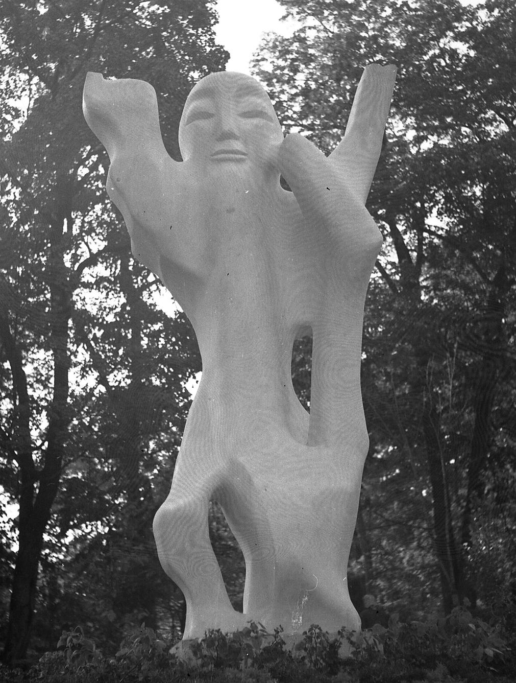 Moise ou la victoire de la lumière. Monumant réalisé en 1963à Aranjelovac, en Serbie. Ce monument a été detruiot par la foudre et il n'en subsiste que la tête.